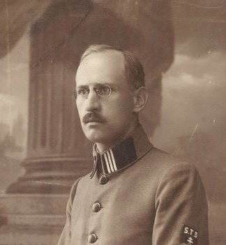 Fedor Ruppeldt, slovenský a československý politik, publicista, kulturní historik, překladatel, básník, hudebník a evangelický biskup